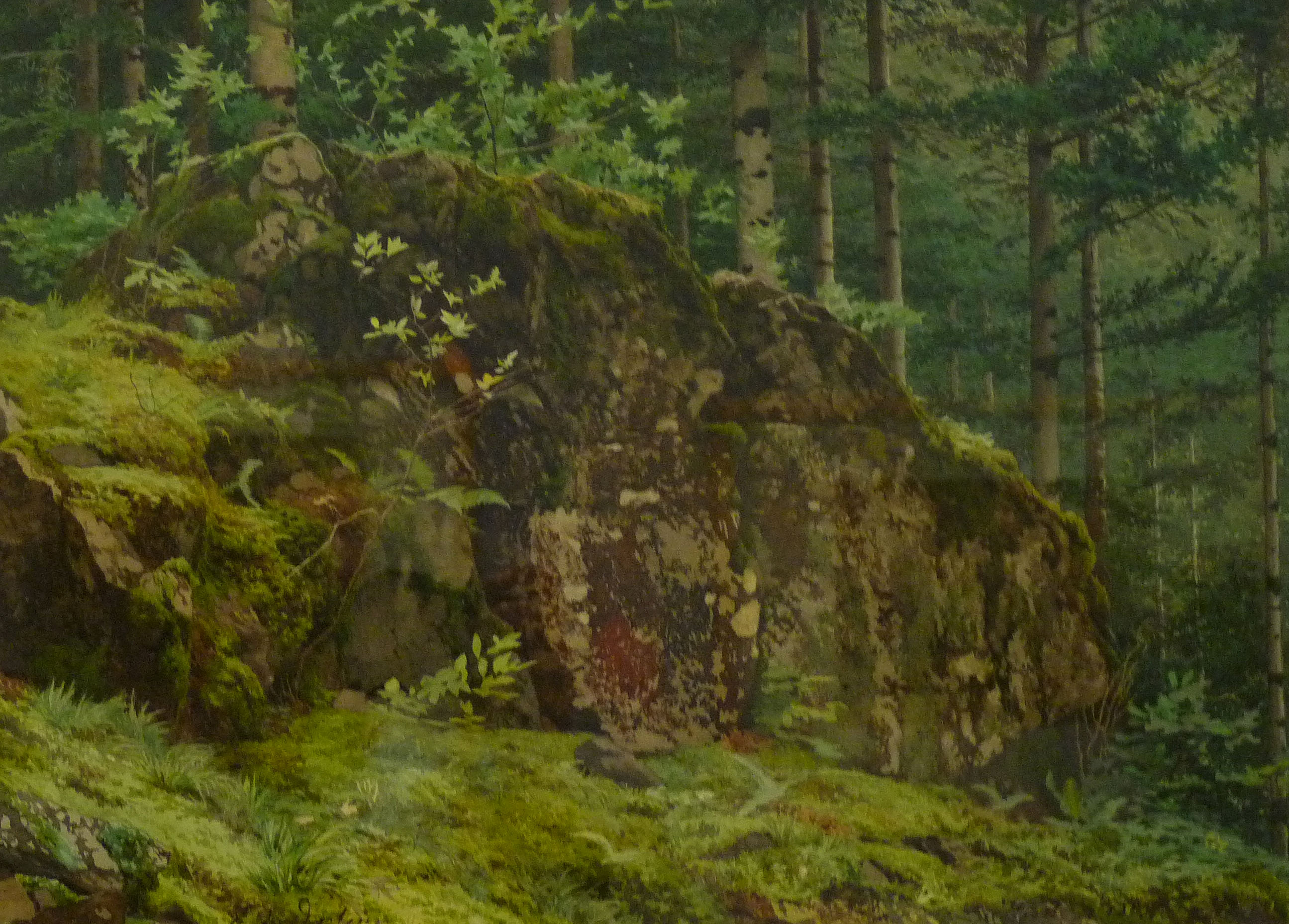 Sous-bois à Ottrotttitle QS:P1476,fr:"Sous-bois à Ottrott" label QS:Lfr,"Sous-bois à Ottrott"